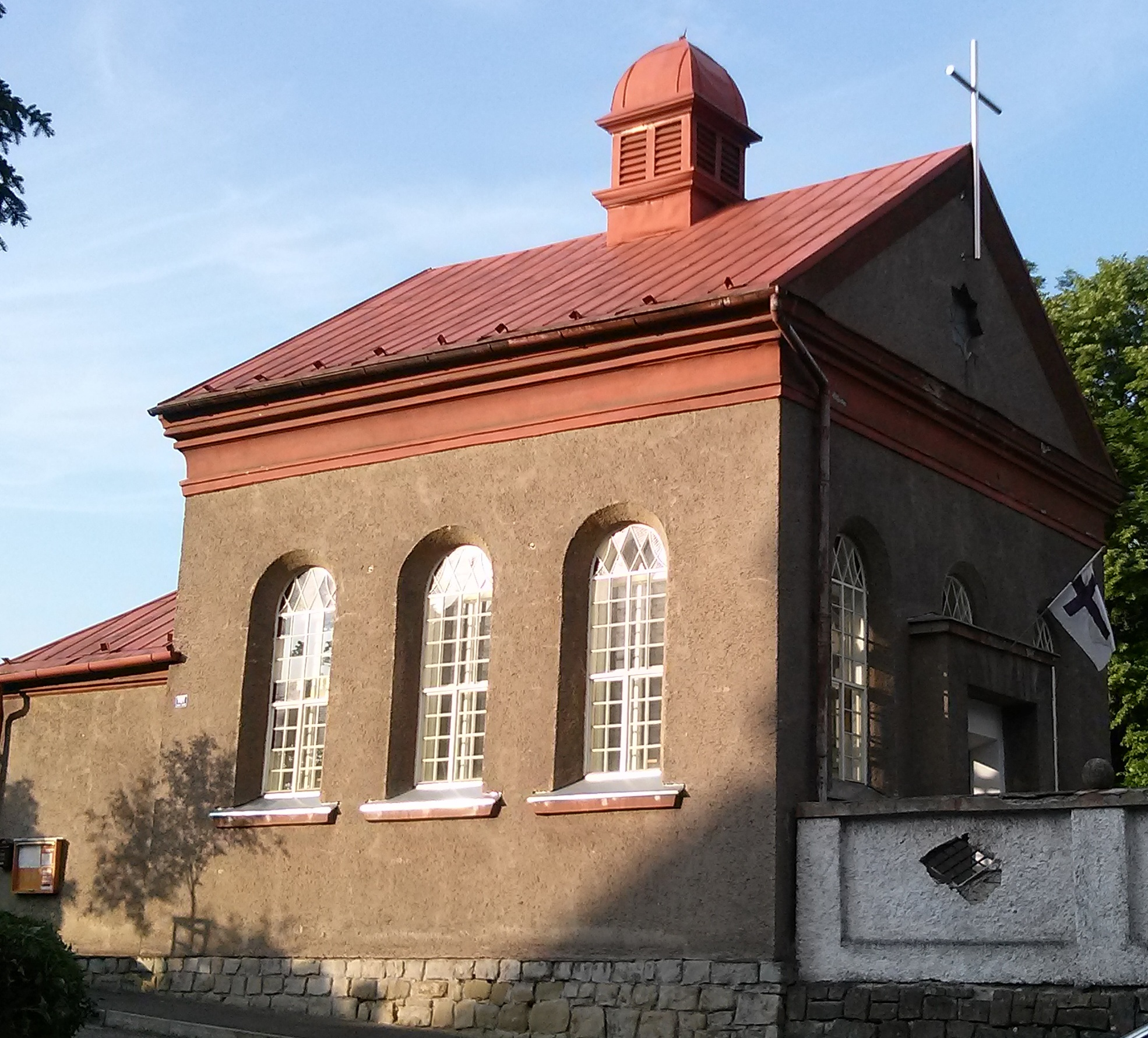 Evangelický kostelík Zmrtvýchvtání Páně v Českém Těšíně (u hřbitova)